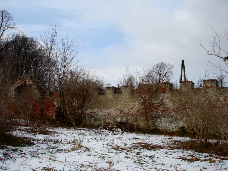 Kamienna Góra, zespół zamkowy, XVI, XIX